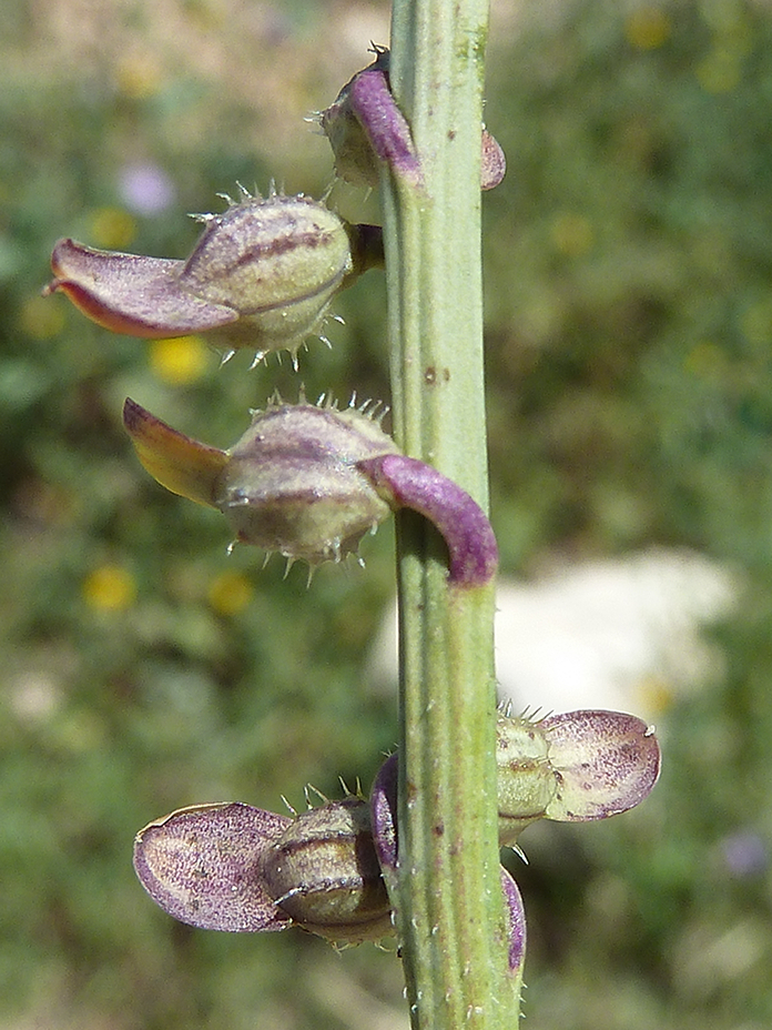 Carrichtera anua (Cucharilla, Mastuerzo valenciano) - Frutos de pedícelos recurvados - Colonia Illicitana (Falda meridional de la Sierra de Crevillente), Albatera (Alicante, España).